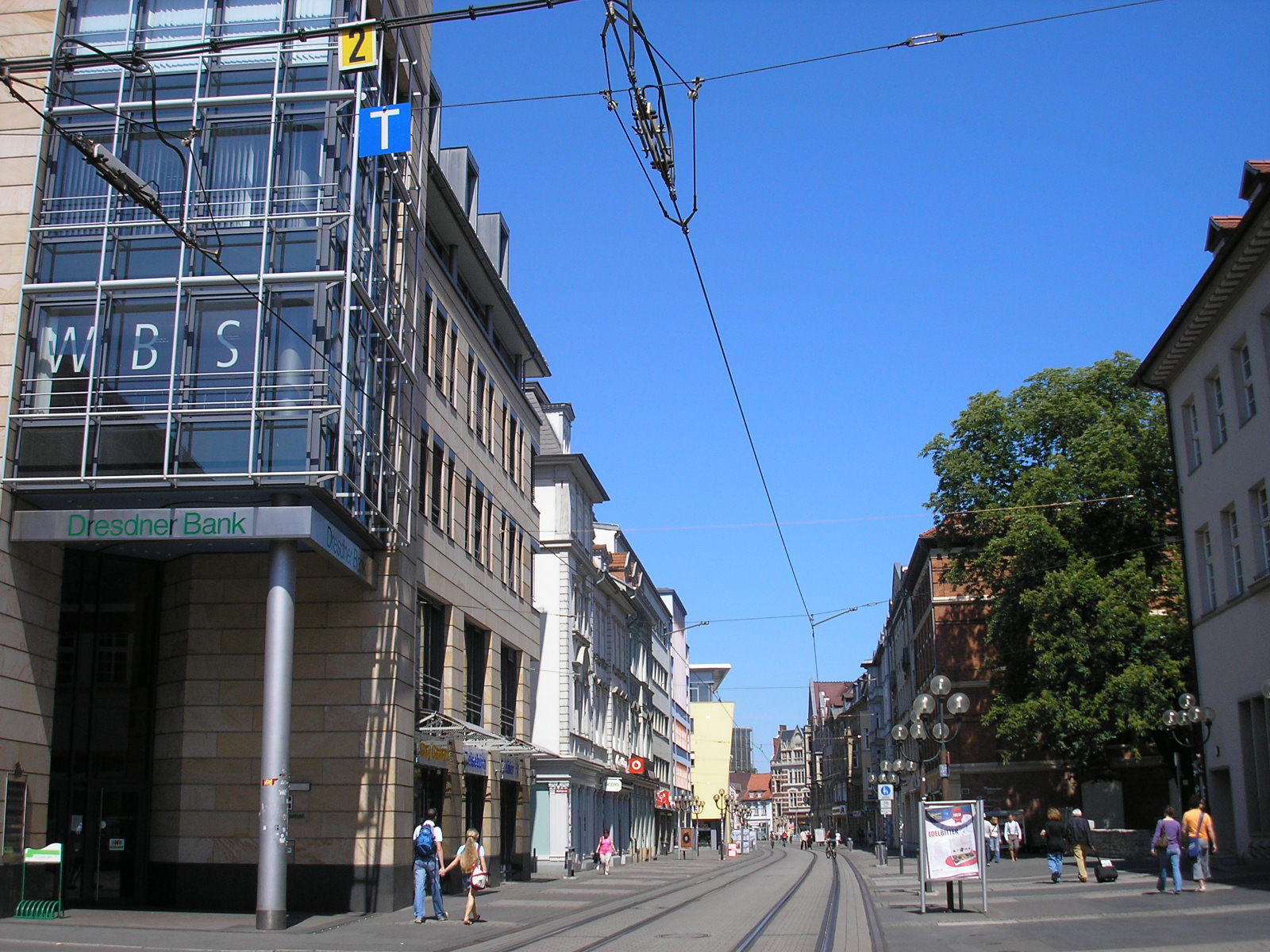 Blick durch die Bahnhofstraße vom Juri-Gagarin-Ring Richtung Anger in Erfurt.